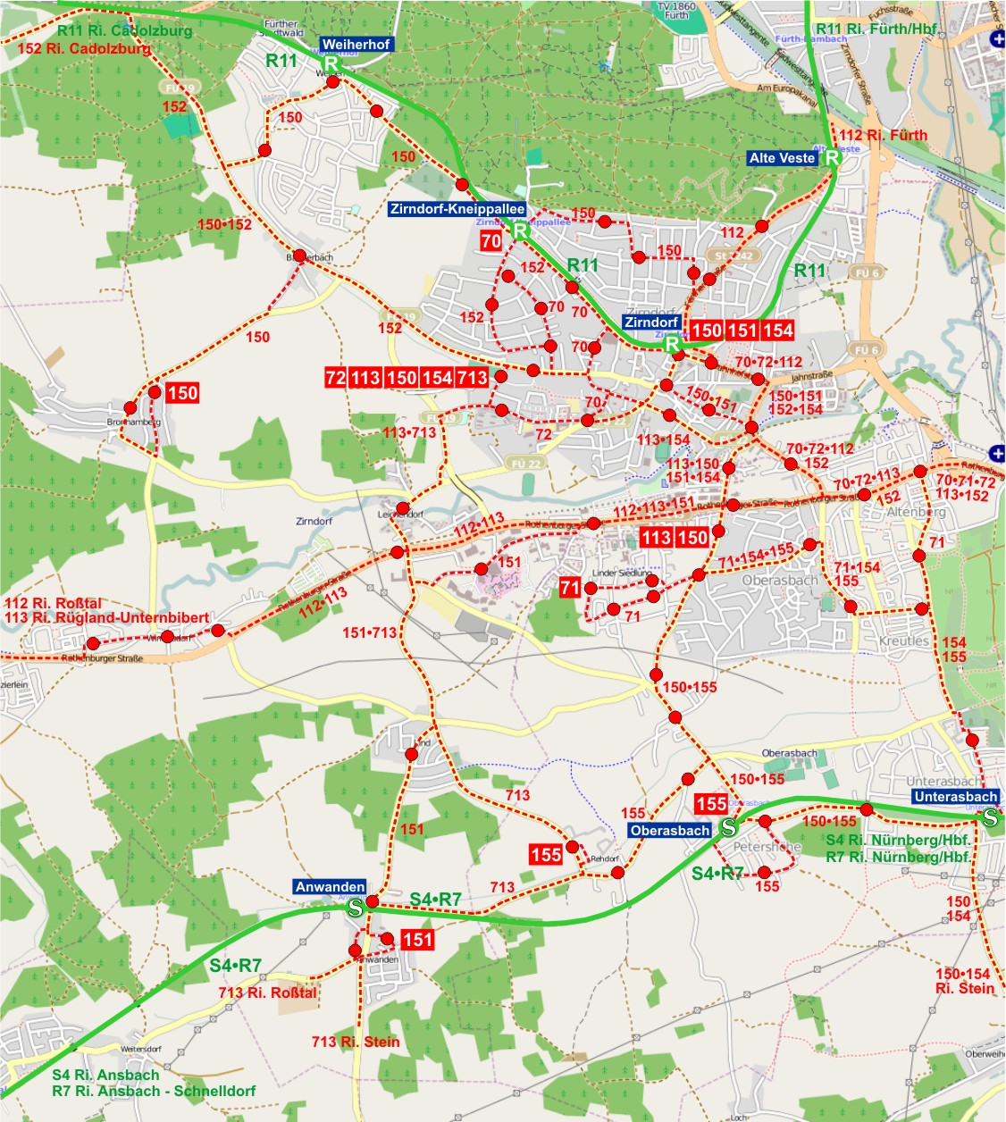 ÖPNV in Zirndorf und Oberasbach